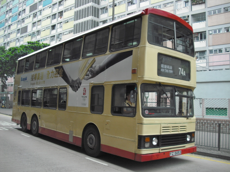 中文（香港）: 九巴74A線的非空調巴士，攝於彩虹巴士總站附近。